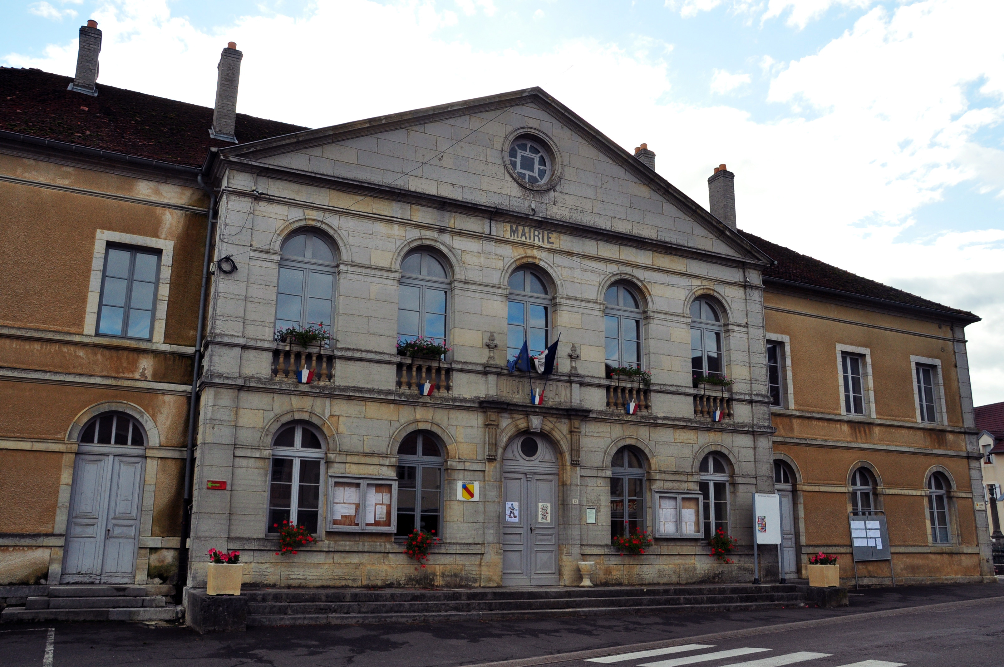 Noroy le Bourg - Ecole, mairie, justice de paix